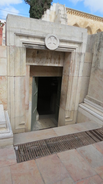 Church of the Pater Noster, Mount of Olives, Jerusalem כנסיית אבינו שבשמים Sanctuary of the Eleona